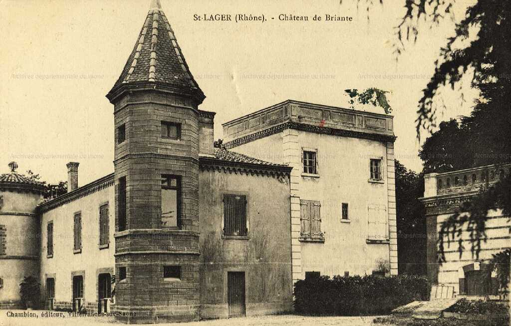 Archives du département du Rhône et de la métropole de Lyon, 11 Fi 2523